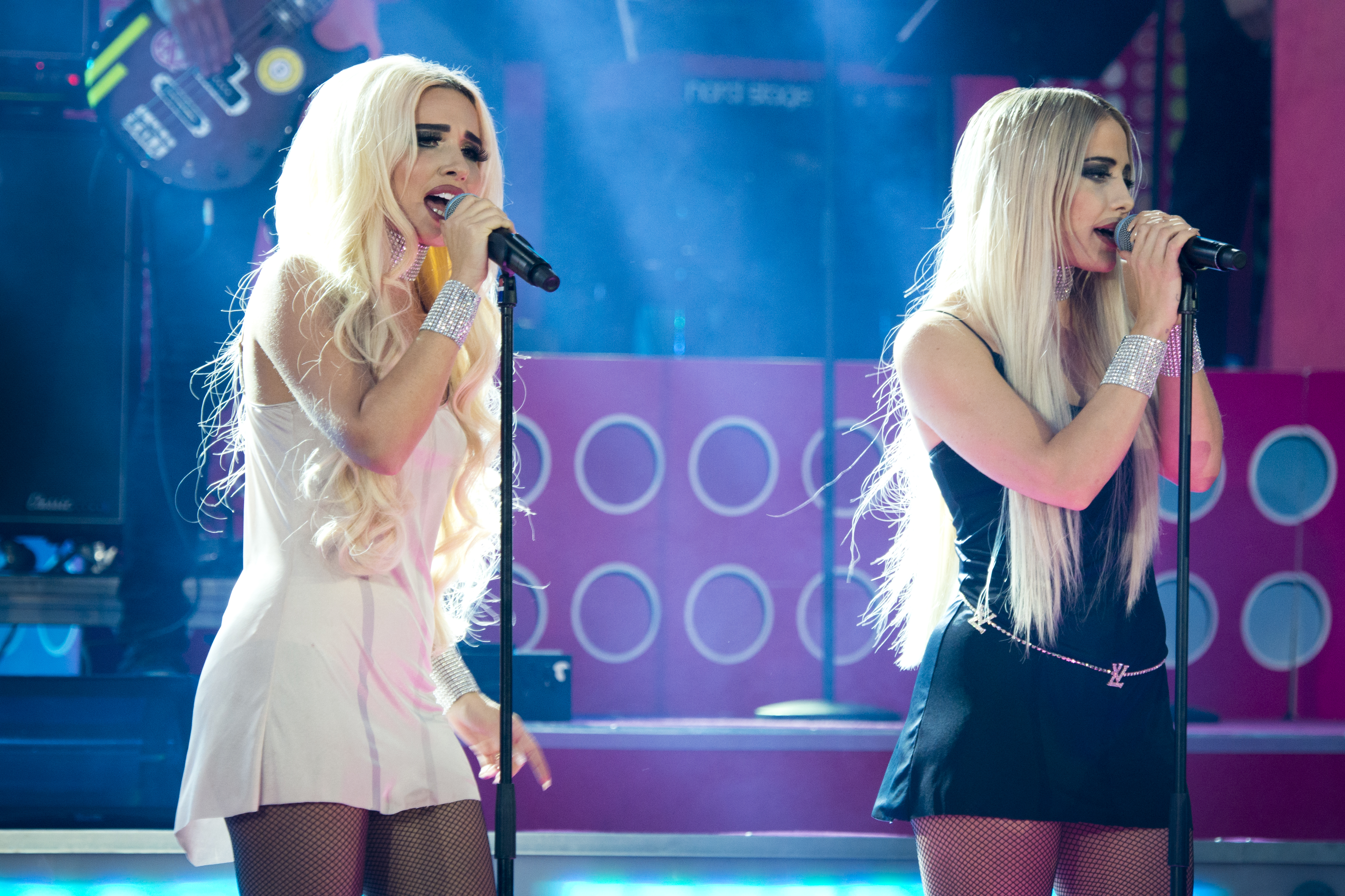 Rebecca & Fiona på Sommarkrysset, Gröna Lund.